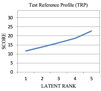 TRP of Latent Rank Theory